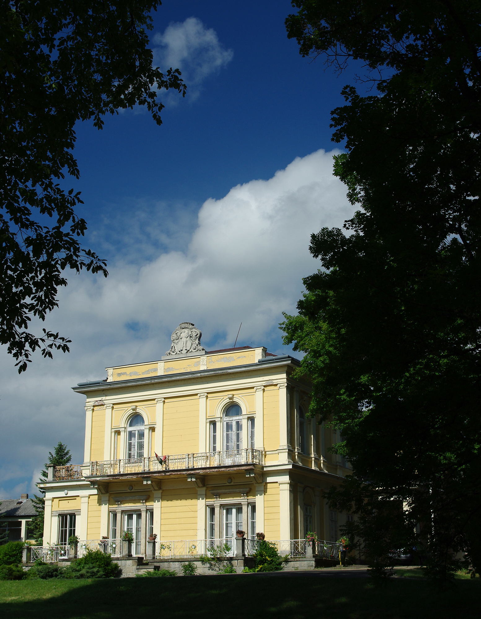 Teleki–Tisza-kastély This is a photo of a monument in Hungary. Identifier: 7153